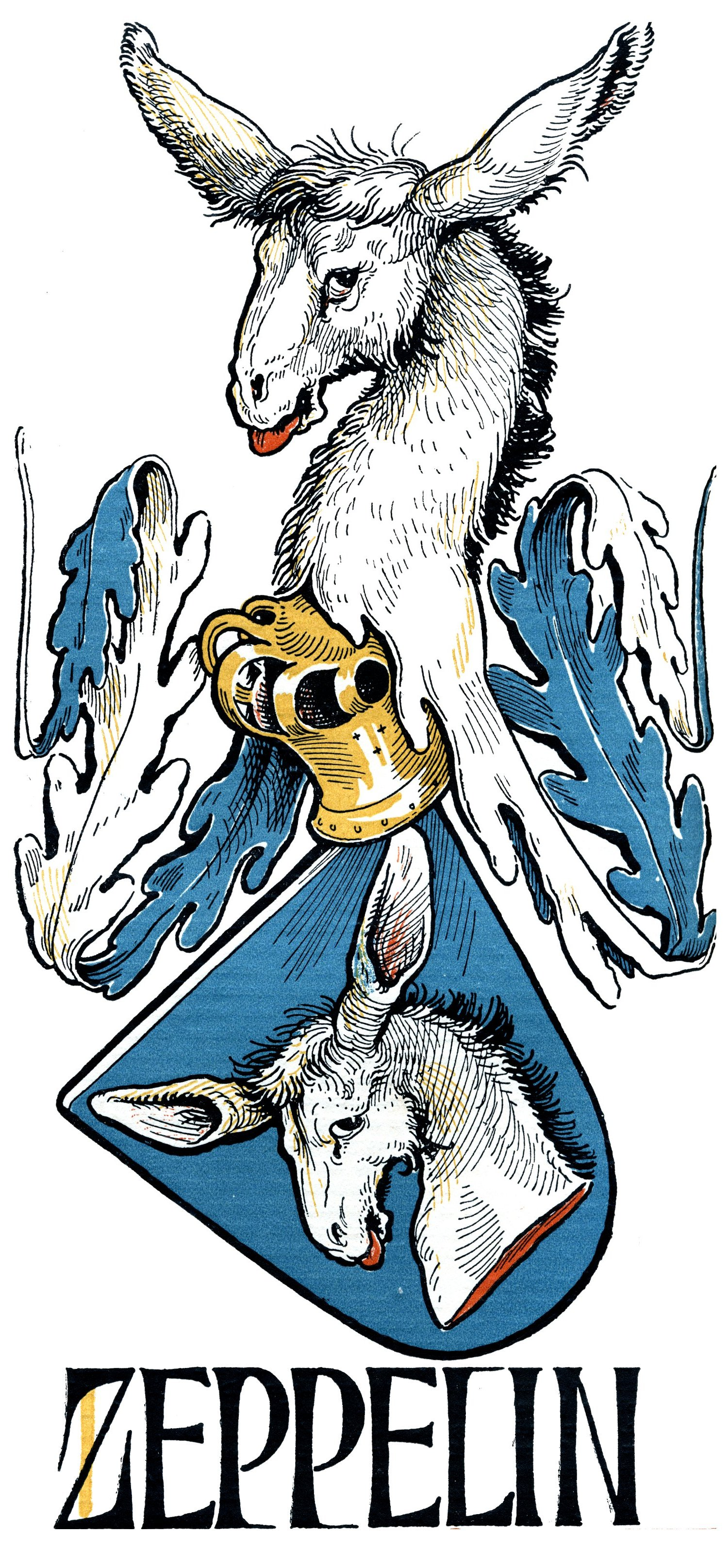 Wappen derer von Zeppelin